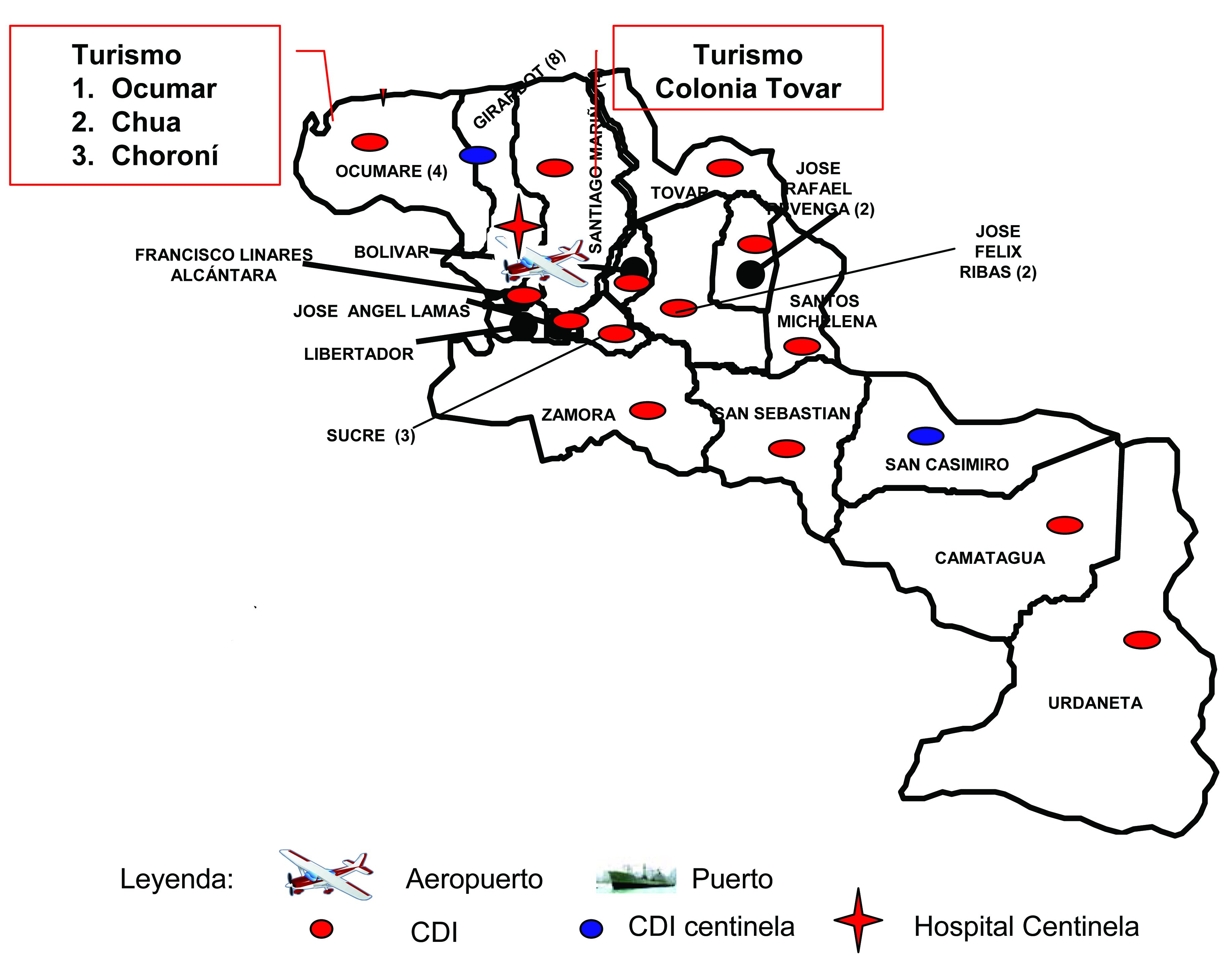 Distribución de CDI en el territorio del estado Aragua, Venezuela para junio de 2009, en medio de la Pandemia H1N1.